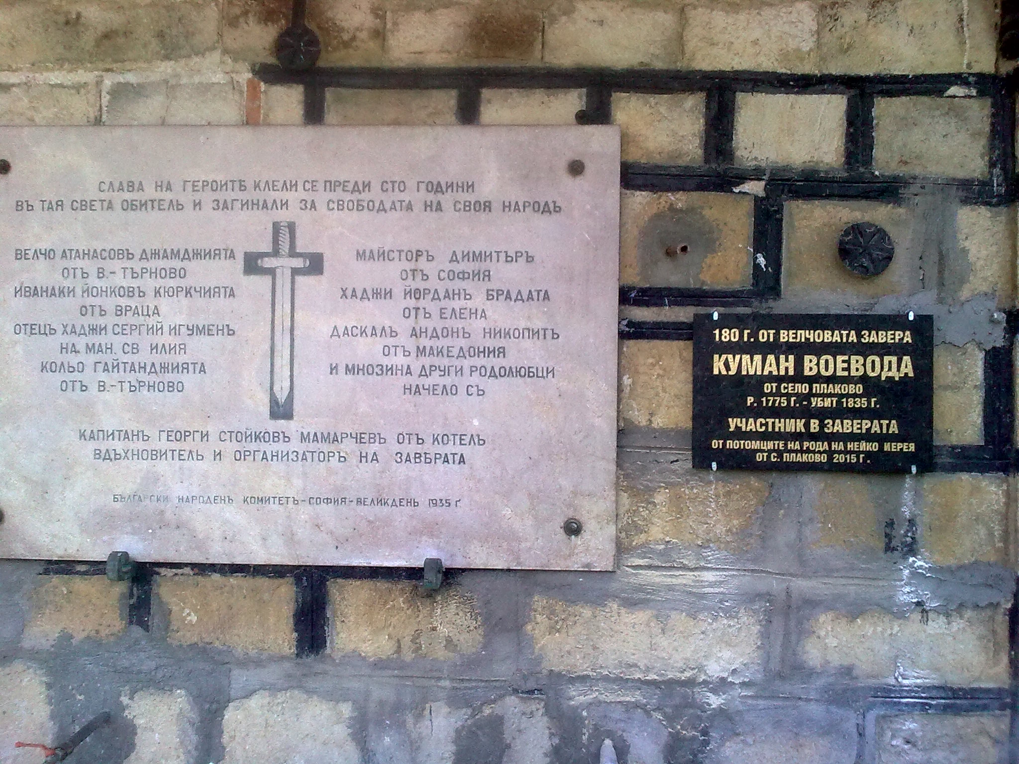 Паметни плочи във връзка с разгрома на Велчовата завера в Плаковски манастир.